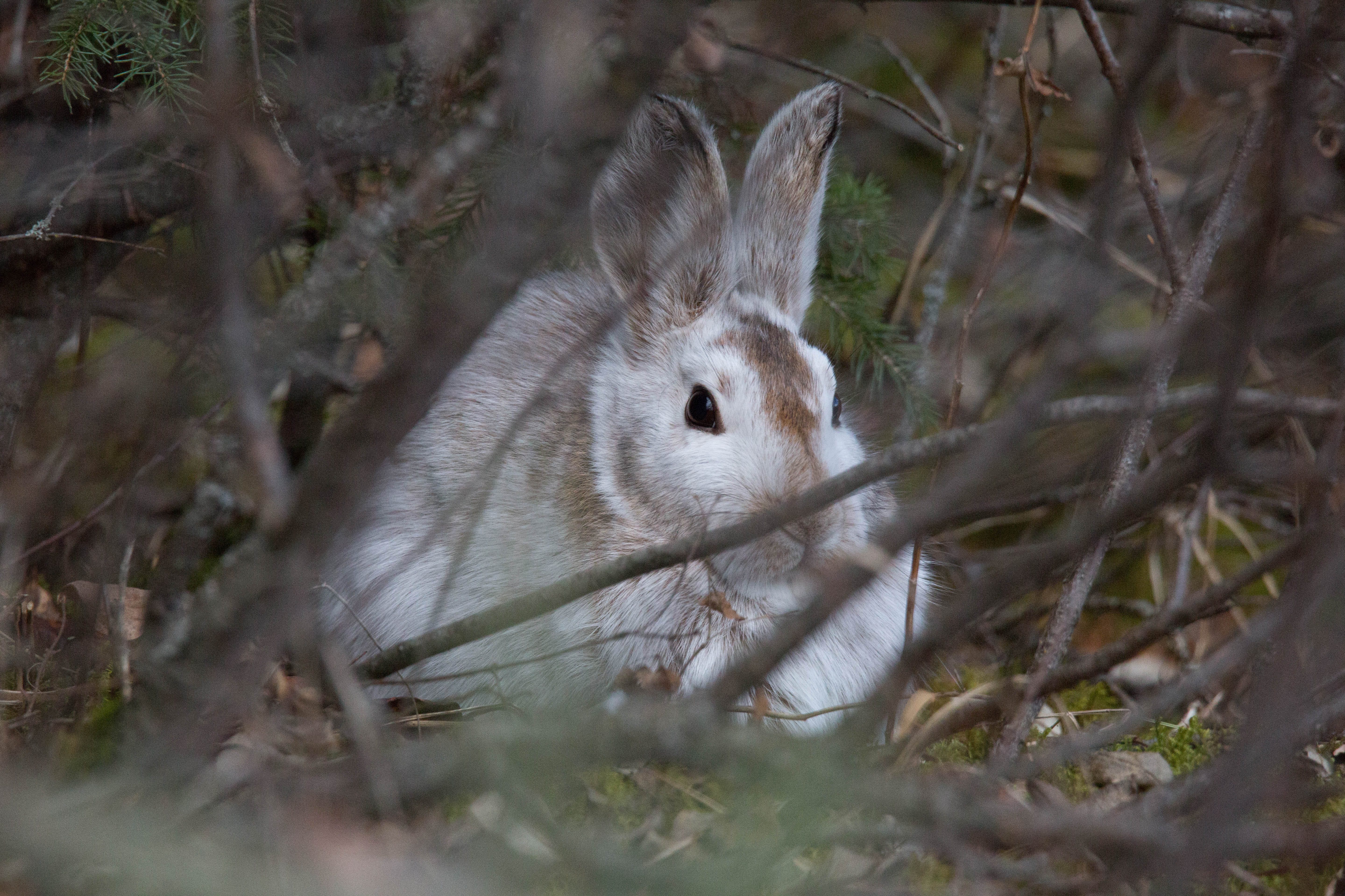 IMG_4302-38.jpg